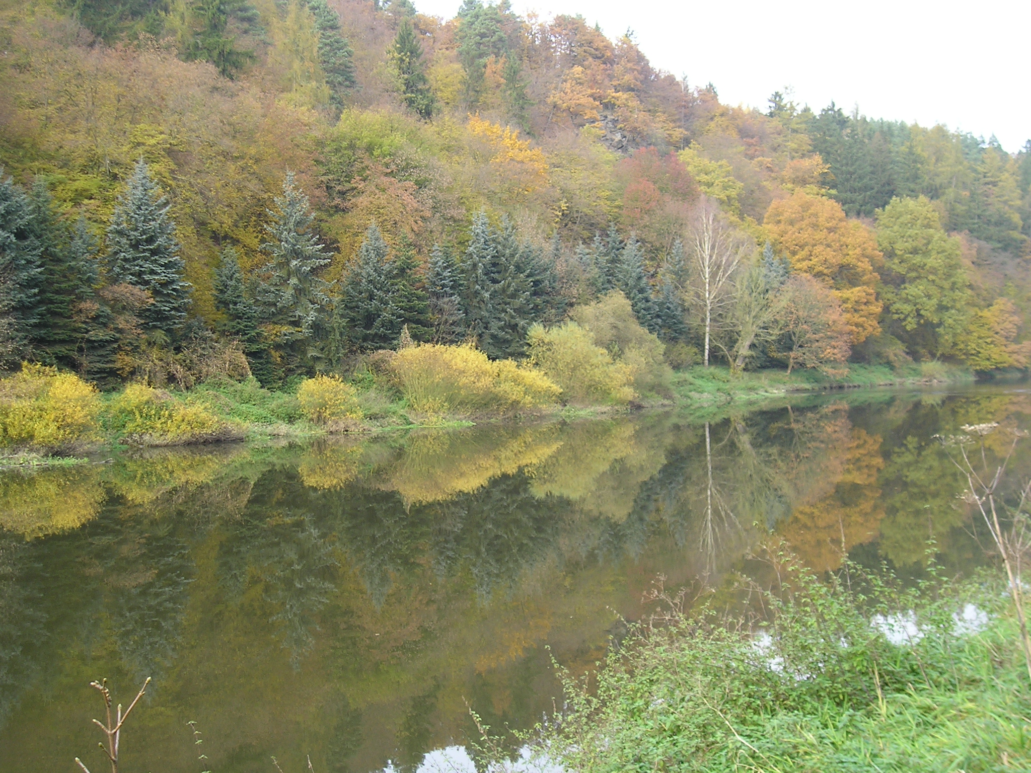 Protější (levý) břeh řeky Berounky se sousedící přírodní rezervací Háj, patřící spolu s přírodní památkou Malochovou skalkou a přírodní rezervací Zábělou mezi evropsky významné lokality.